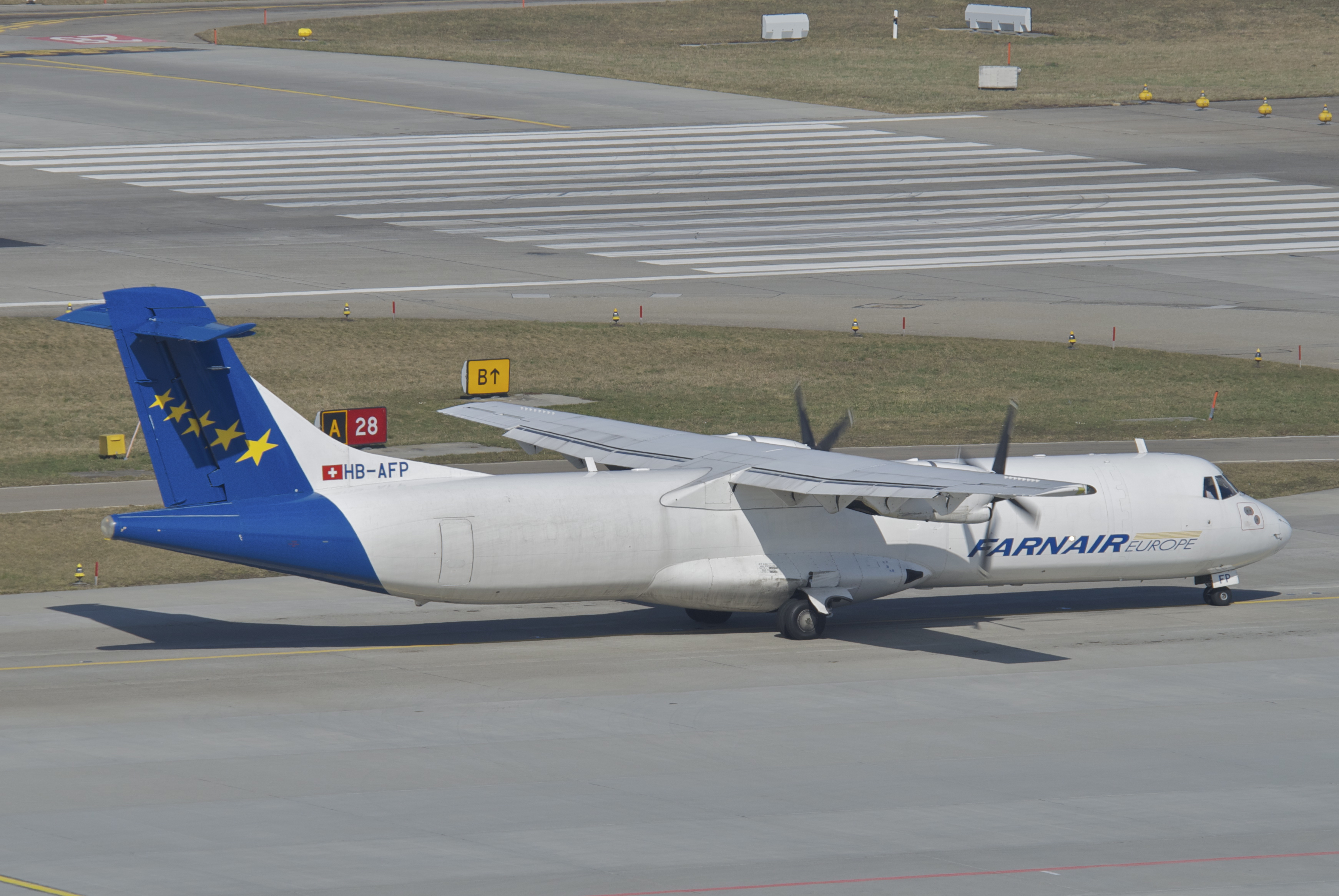 Farnair Europe ATR 72-201F; HB-AFP@ZRH;14.03.2012/644ao